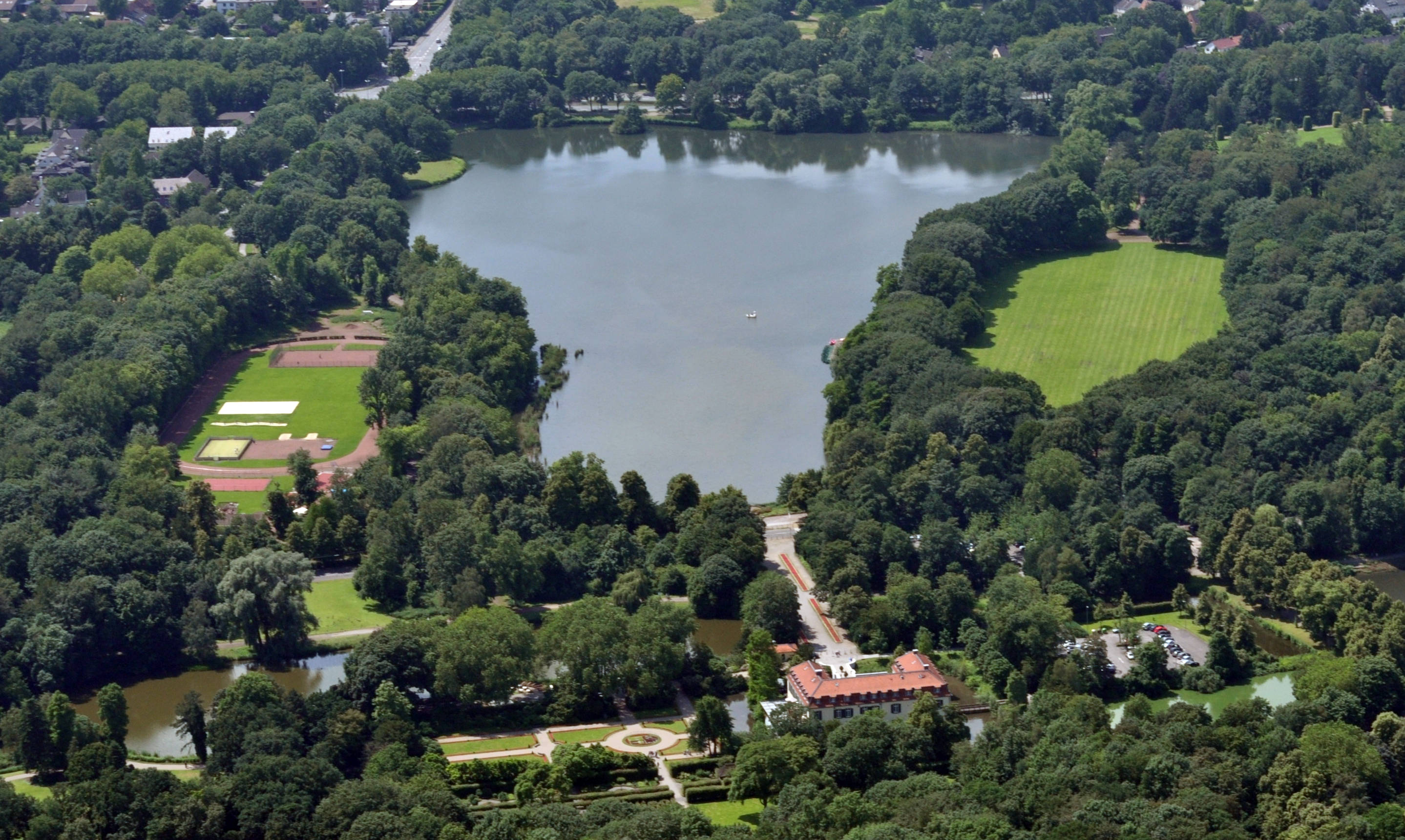 Schloss Berge, Ruhrgebiet